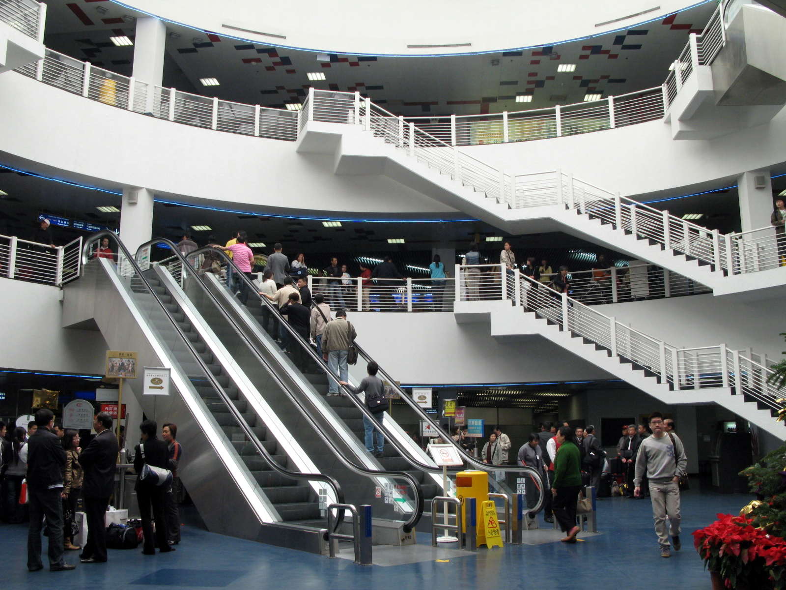 Terminal Marítimo in Macao